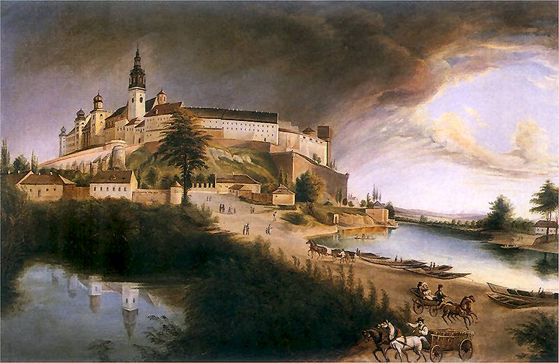 Staw na Groblach i przystań flisaków na Wiśle pod Wawelem naprzeciw Dębnik. (Widok z bastei zwanej bastionem Władysława IV ku zachodowi) 1845. Olej na płótnie. 50 x 63 cm. Państwowe Zbiory Sztuki na Wawelu.